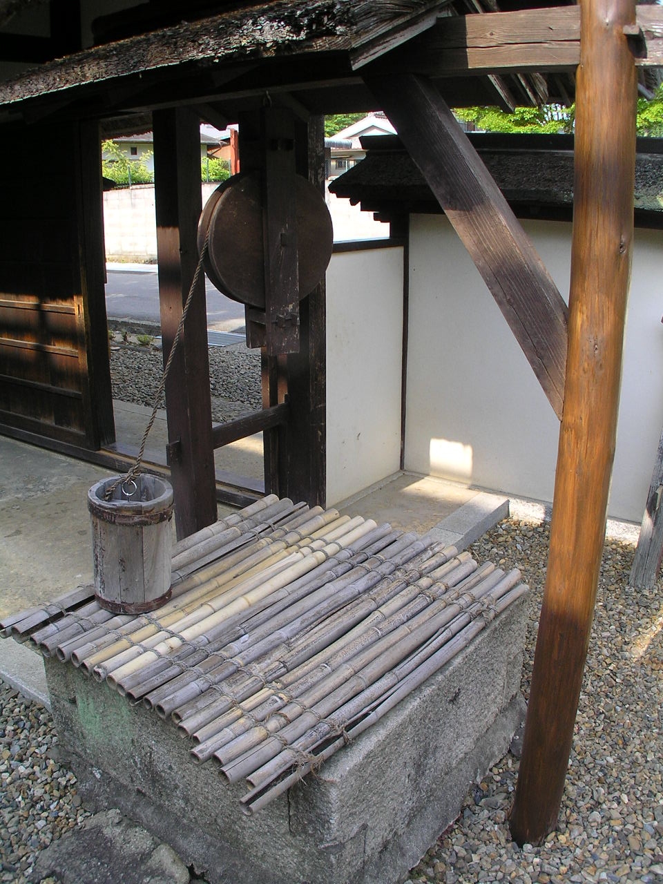 篠山市安間家釣瓶